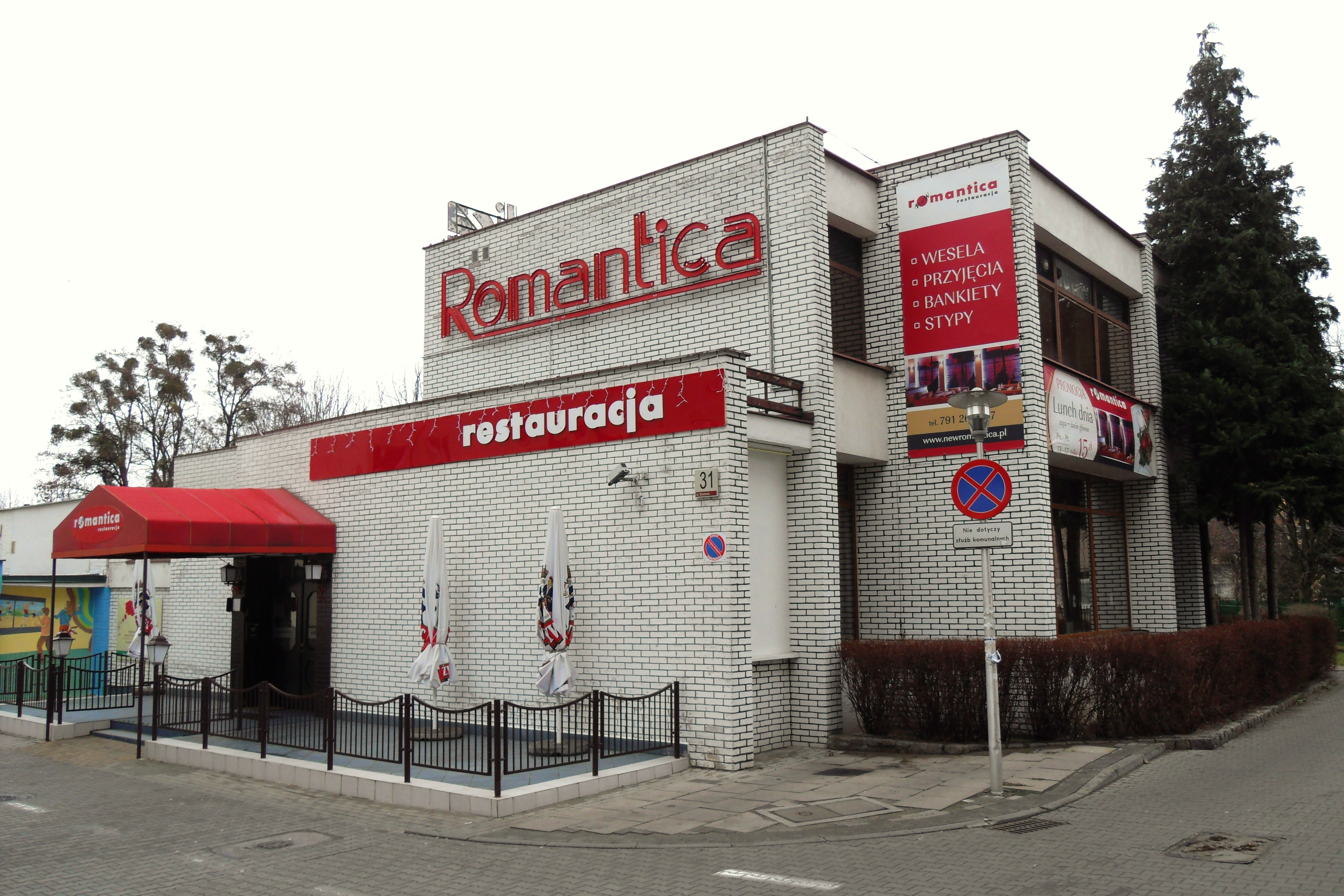 Gdańsk Zaspa. Restauracja "Romantica", ul. Startowa 31. "Zagrała" w serialu "Radio Romans".